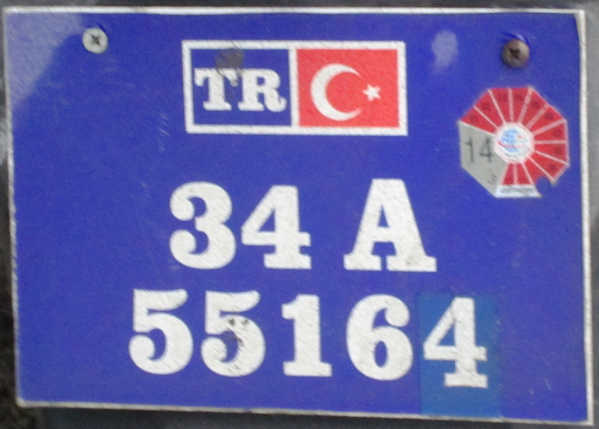 Politie kentekenplaat motorfiets (34 - Istanboel) Turkije